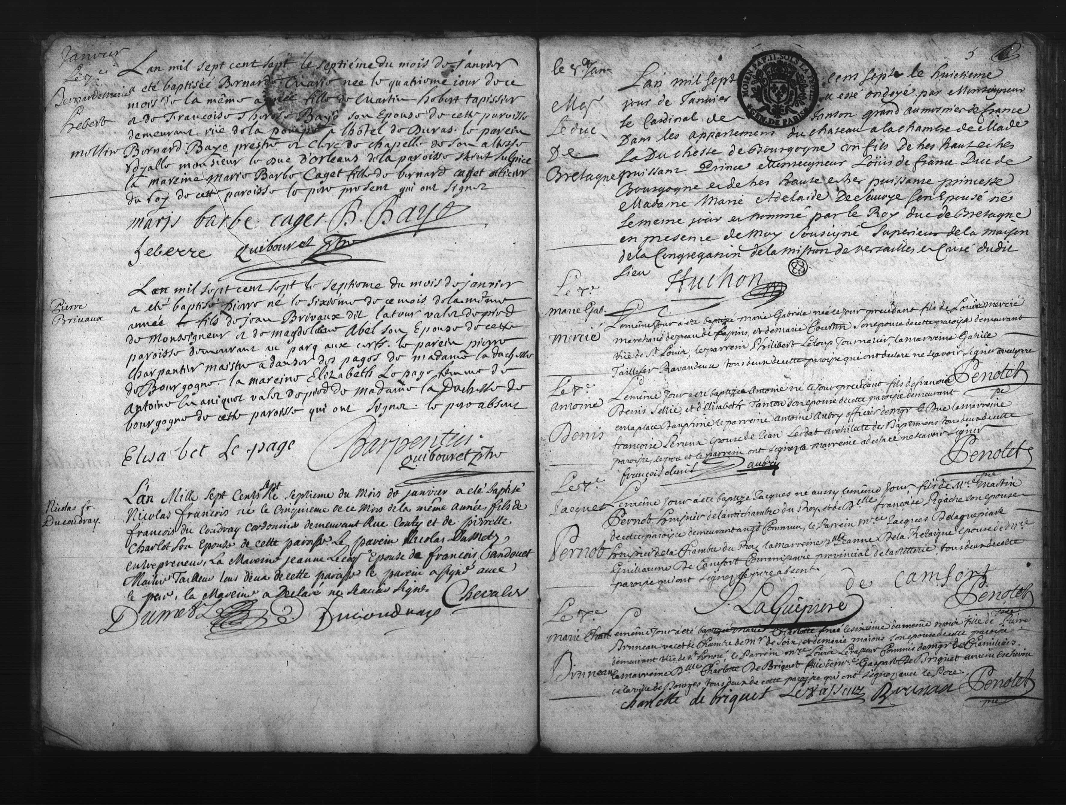 Archives Yvelines